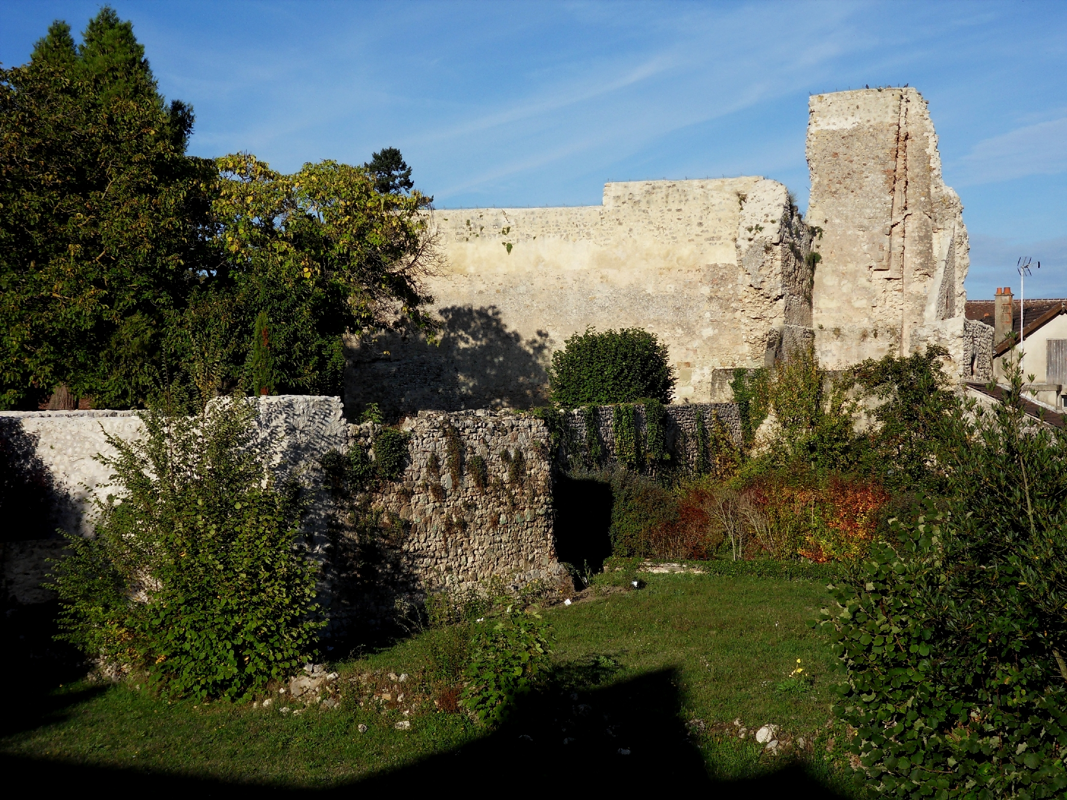 Château de Verneuil-en-Bourbonnais, (Inscrit, 1928)